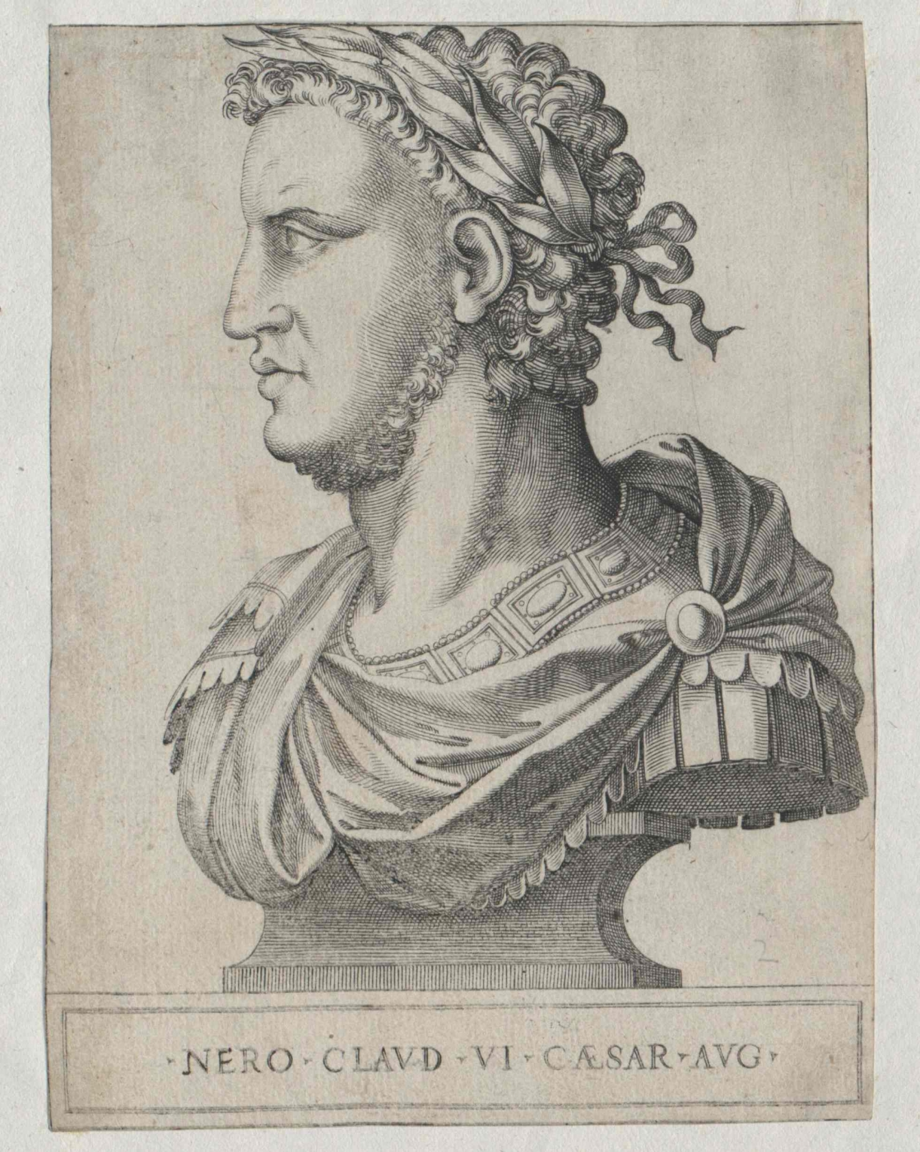 Nero, römischer Kaiser